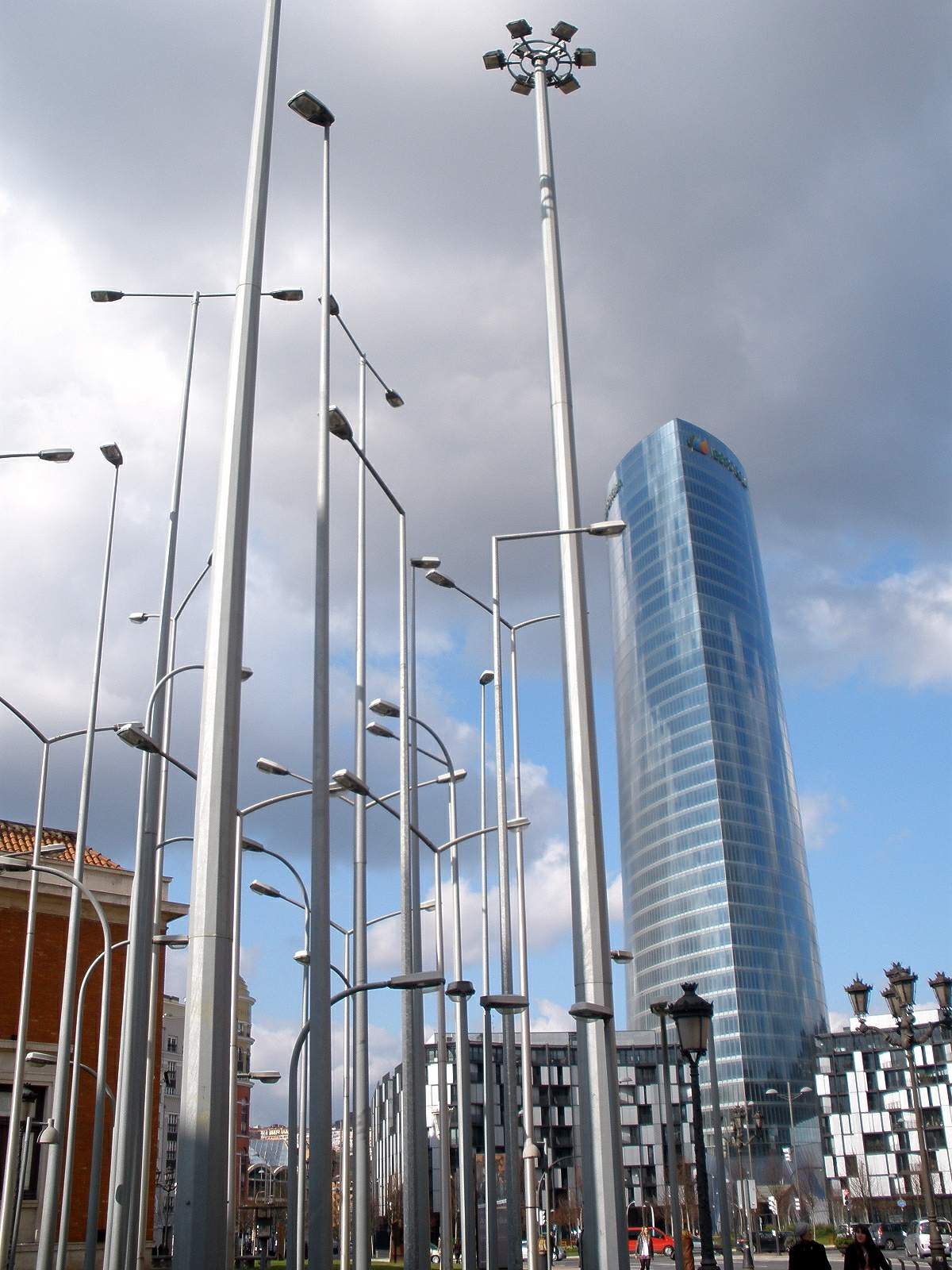 Bilbao - Torre Iberdrola y Bosque de Farolas